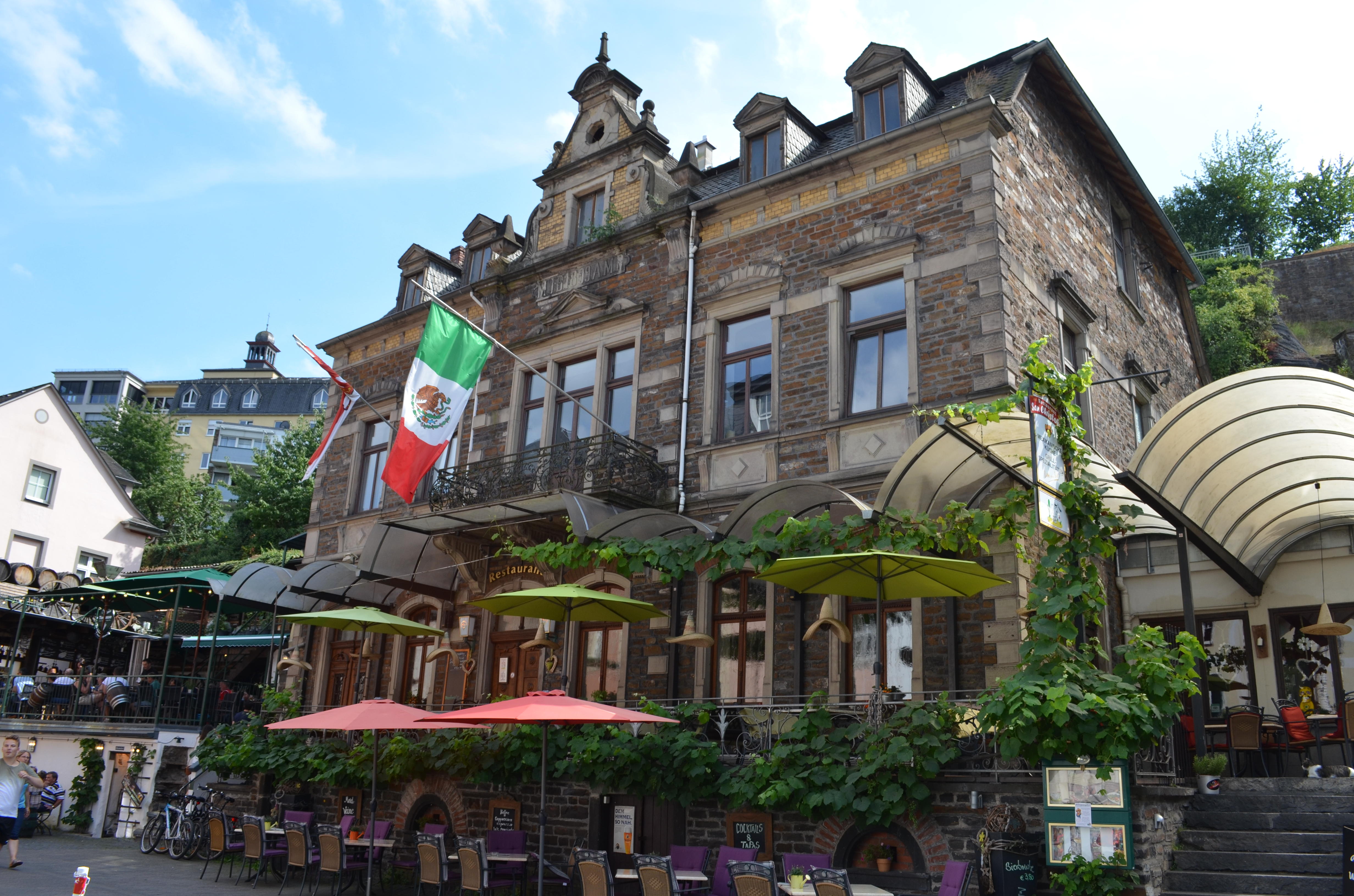 Endertstraße 7 in Cochem: späthistoristischer Bruchsteinbau, Neurenaissance, bezeichnet 1899, heute Restaurant.